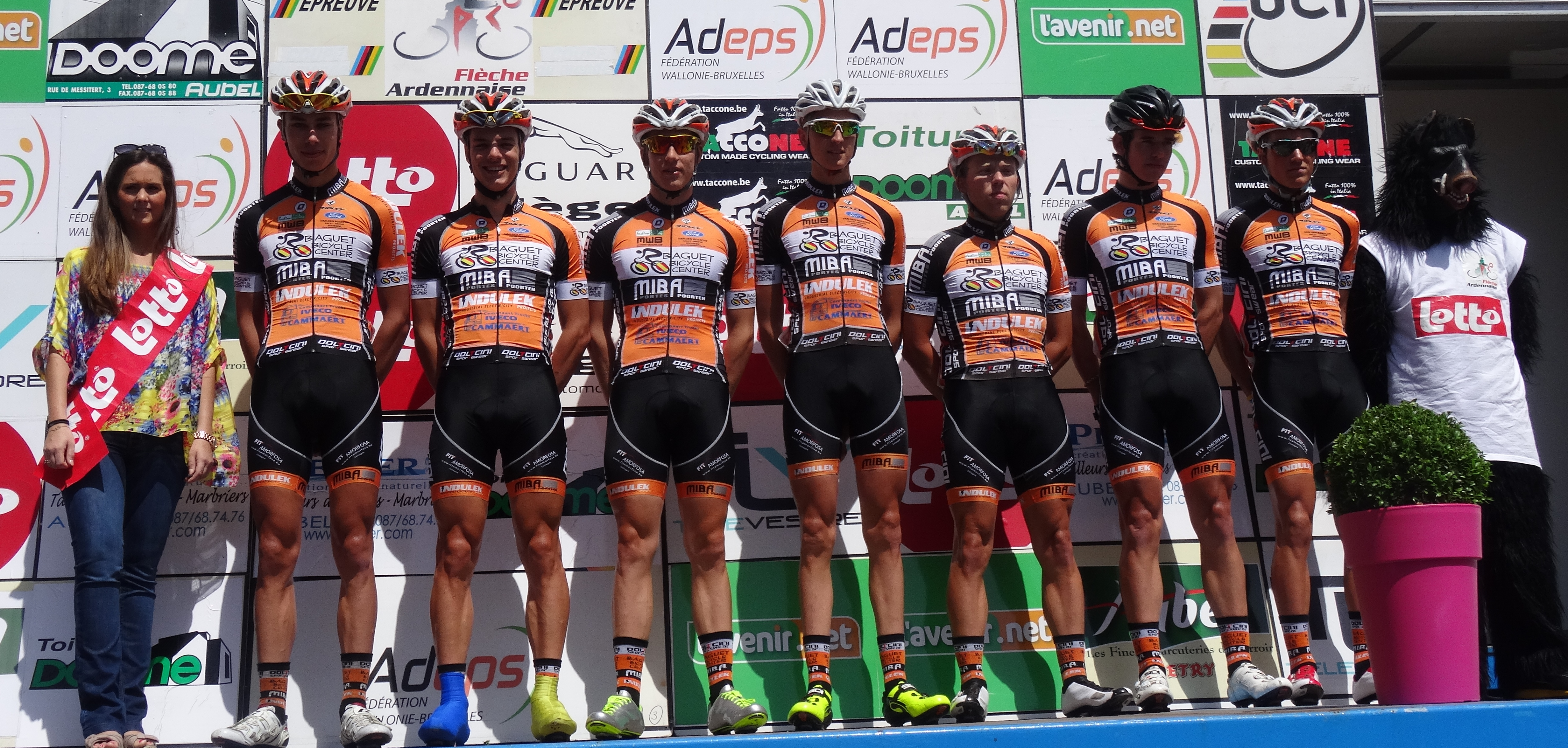 Reportage photographique réalisé le dimanche 22 juin à l'occasion du départ et de l'arrivée de la Flèche ardennaise 2014 à Herve, Belgique.